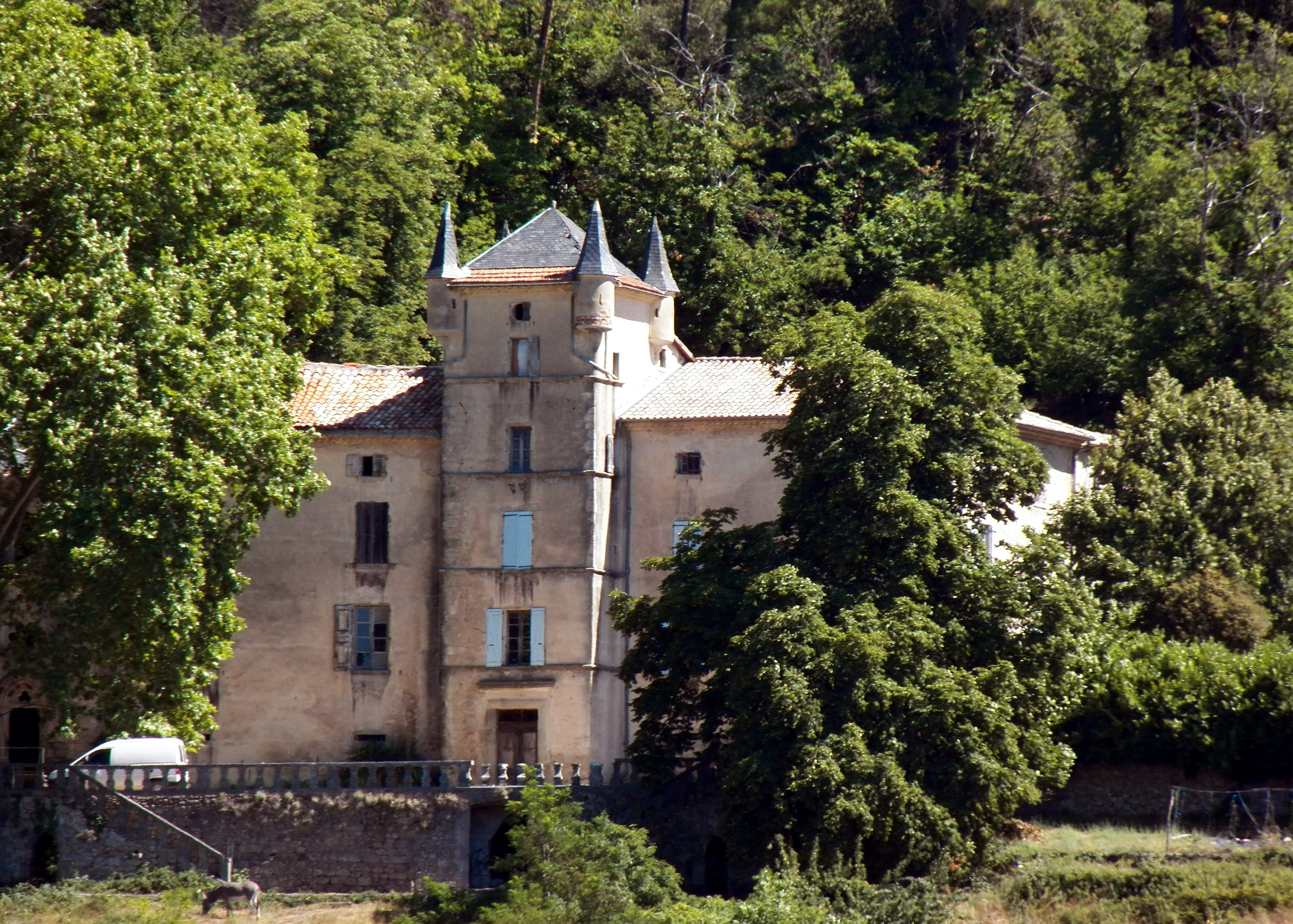 Le chateau de Logeres à Joannas (Ardeche), construit au XIIeme siecle, profondement remanie au XVIIIeme.